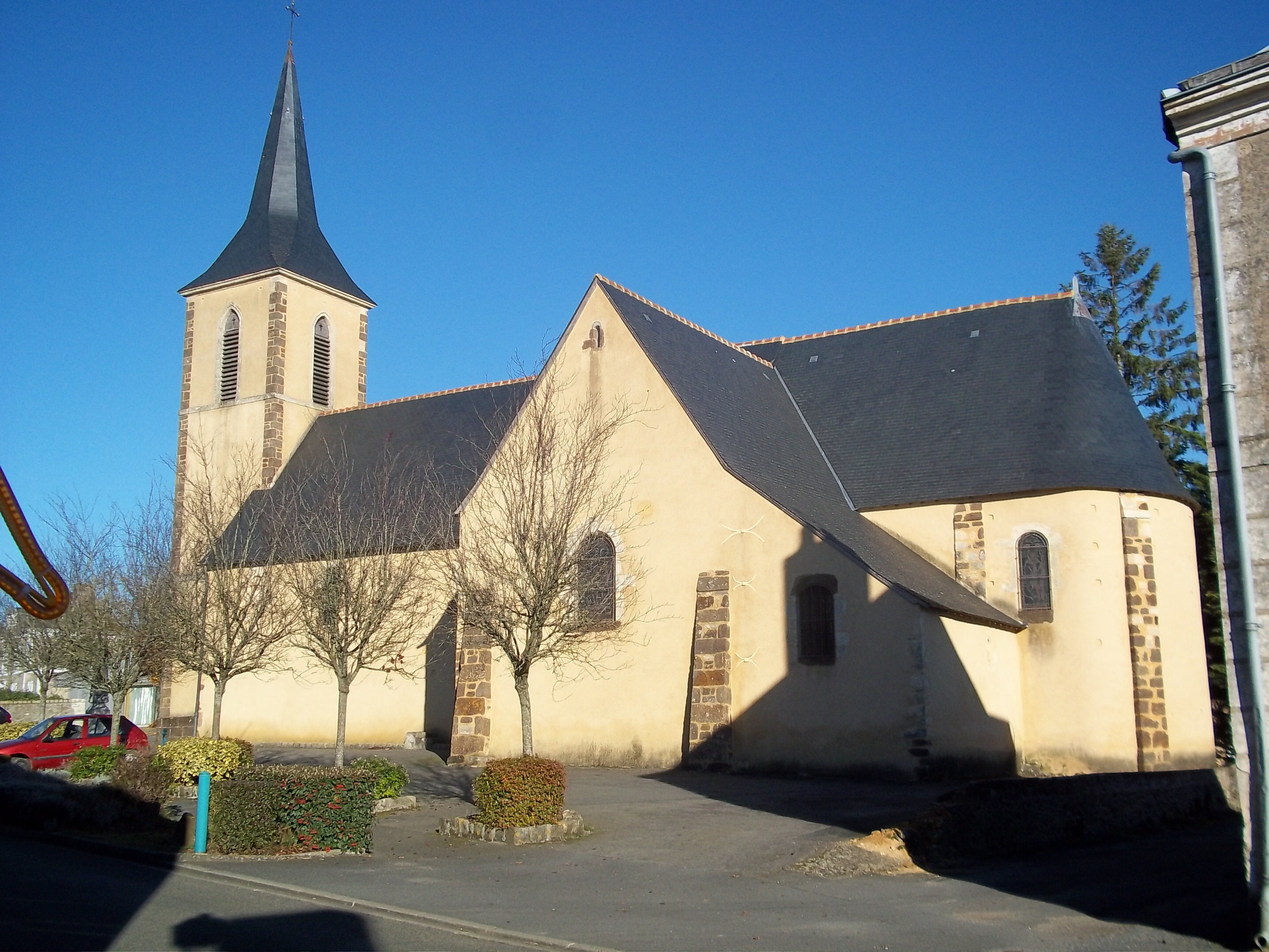 Eglise de Pezé-le-Robert - 72